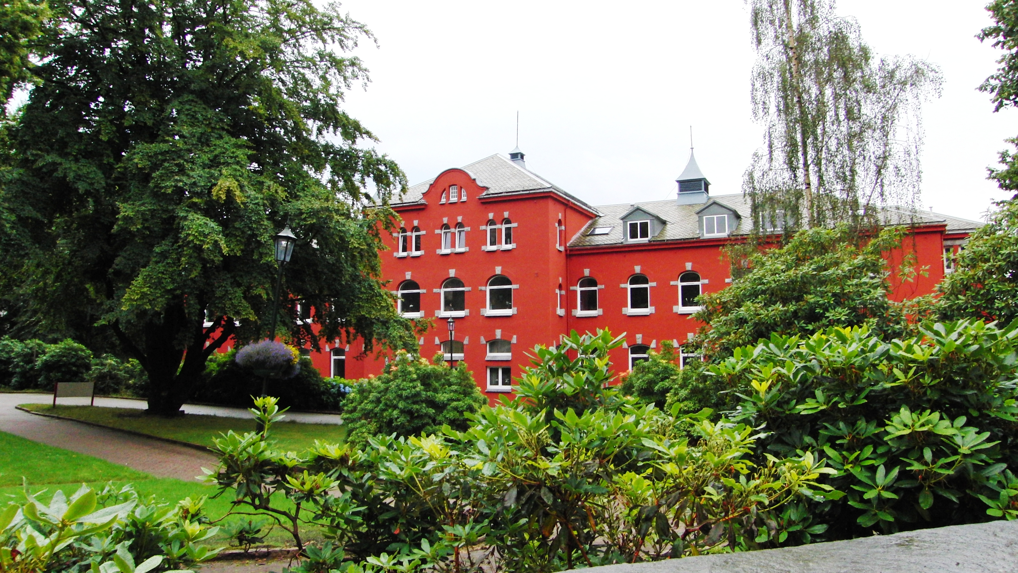 Haukeland Universitetssykehus